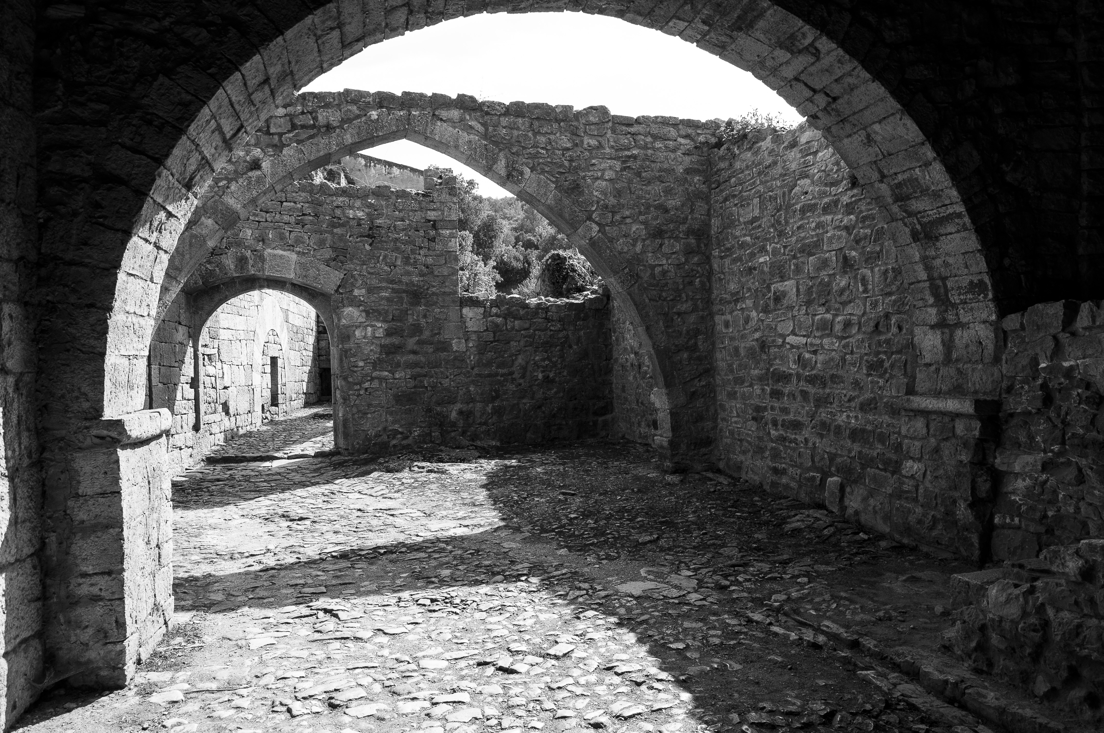 Ruines bâtiment des convers arcades, abbaye du Thoronet.